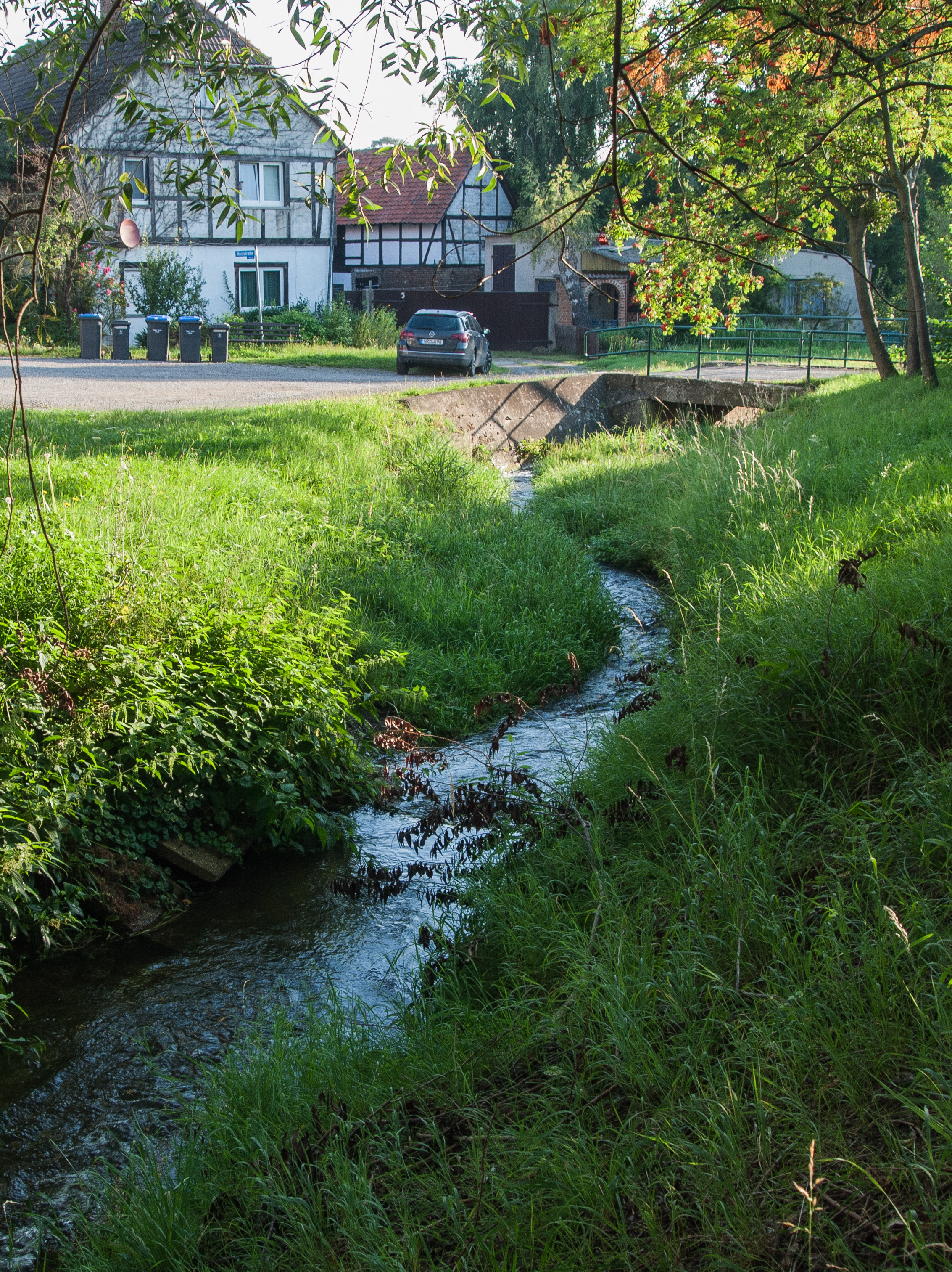 Wienrode, Silberbach (Stadt Blankenburg, Landkreis Harz, Sachsen-Anhalt)